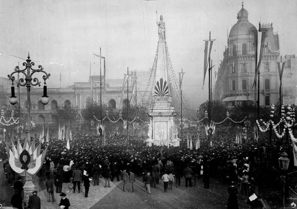 Fiestas mayas en Plaza de Mayo, Buenos Aires 1899. Inventario 9441. General Archive of the Nation (Argentina) Native nameArchivo General de la Nación ArgentinaLocationBuenos Aires, ArgentinaEstablished28 August 1821Website control : Q2860529 This file, was provided to Wikimedia Commons thanks to an agreement between the General Archive of the Nation of Argentina and Wikimedia Argentina.